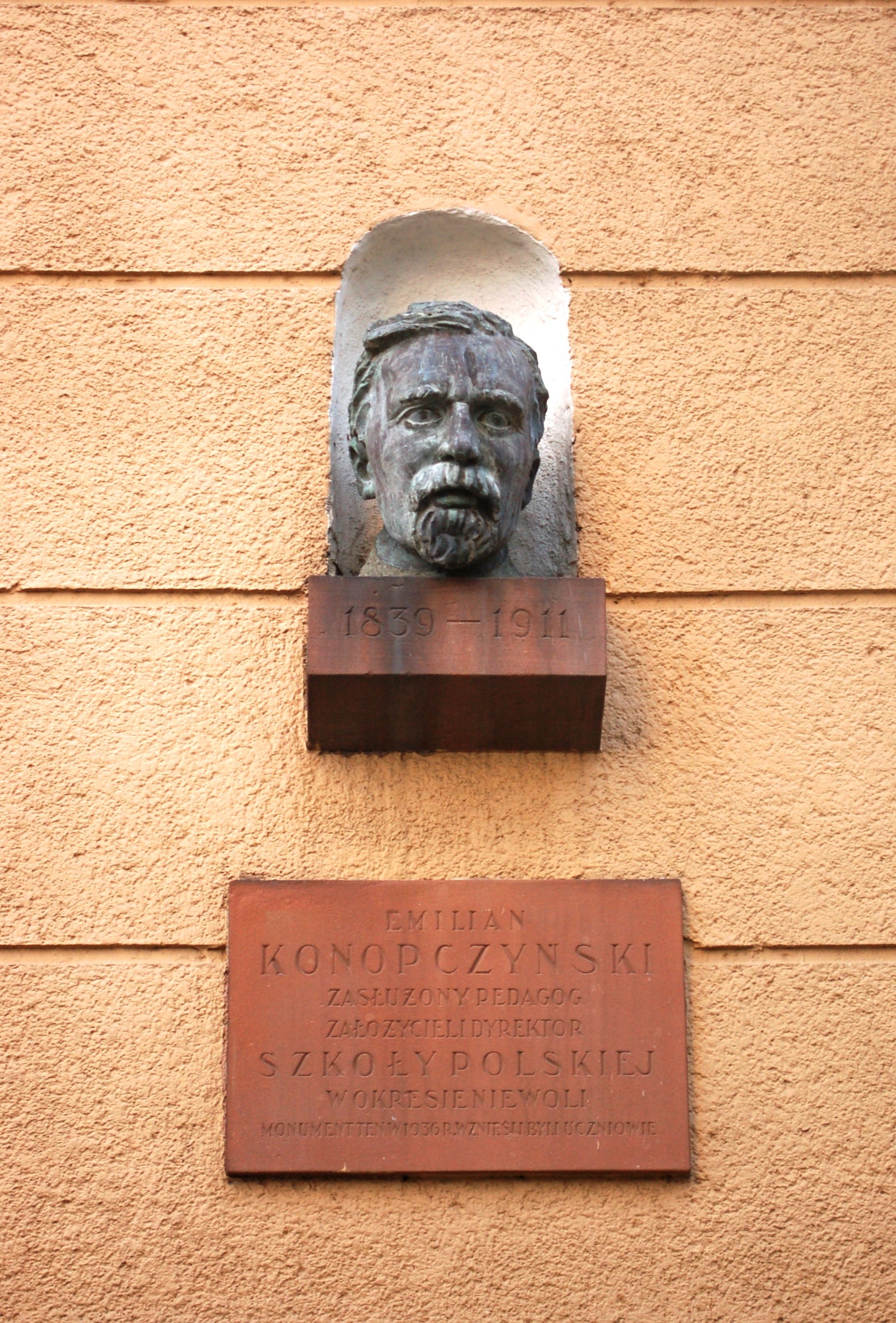 Warschau